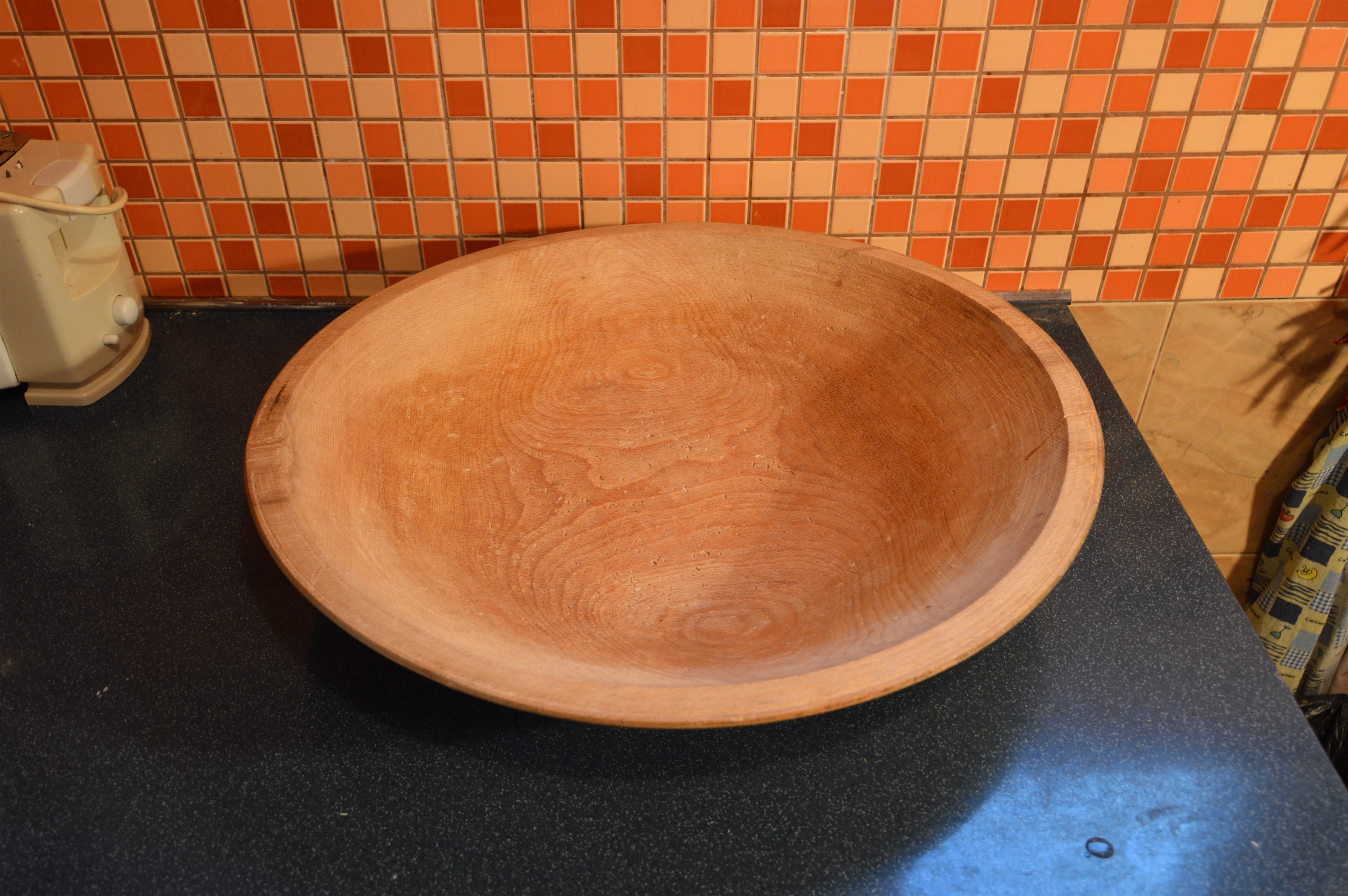 Нощви